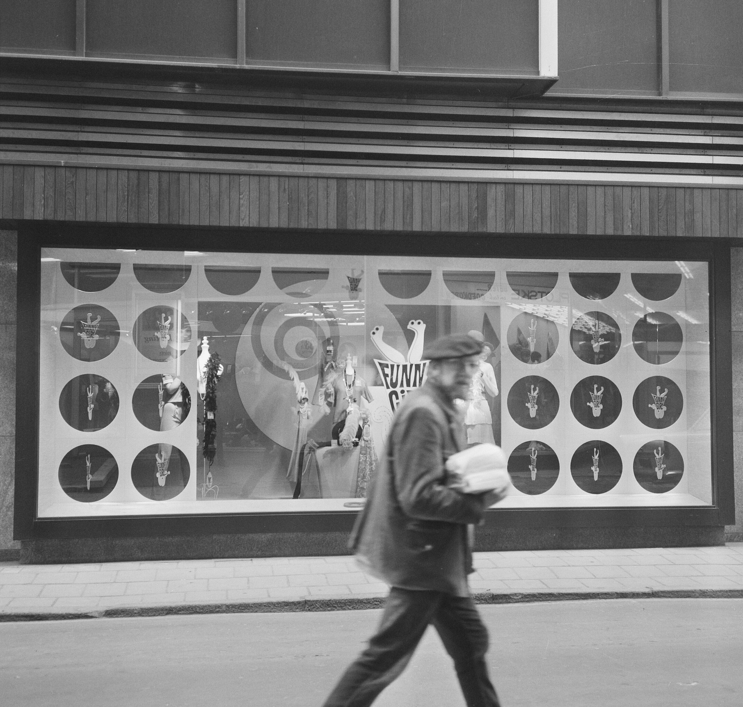 Collectie / Archief : Fotocollectie Anefo Reportage / Serie : [ onbekend ] Beschrijving : Opdracht Columbia International Film etalages (bord) Datum : 28 februari 1969 Trefwoorden : ETALAGES, borden Persoonsnaam : COLUMBIA Fotograaf : Mieremet, Rob / Anefo Auteursrechthebbende : Nationaal Archief Materiaalsoort : Negatief (zwart/wit) Nummer archiefinventaris : bekijk toegang 2.24.01.03 Bestanddeelnummer : 922-1478